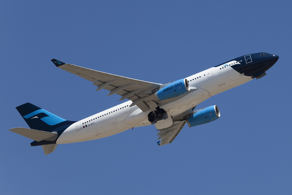 XA-MXP A330 Mexicana